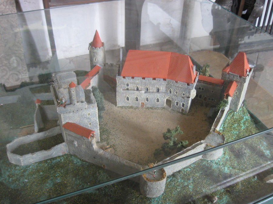 pałac